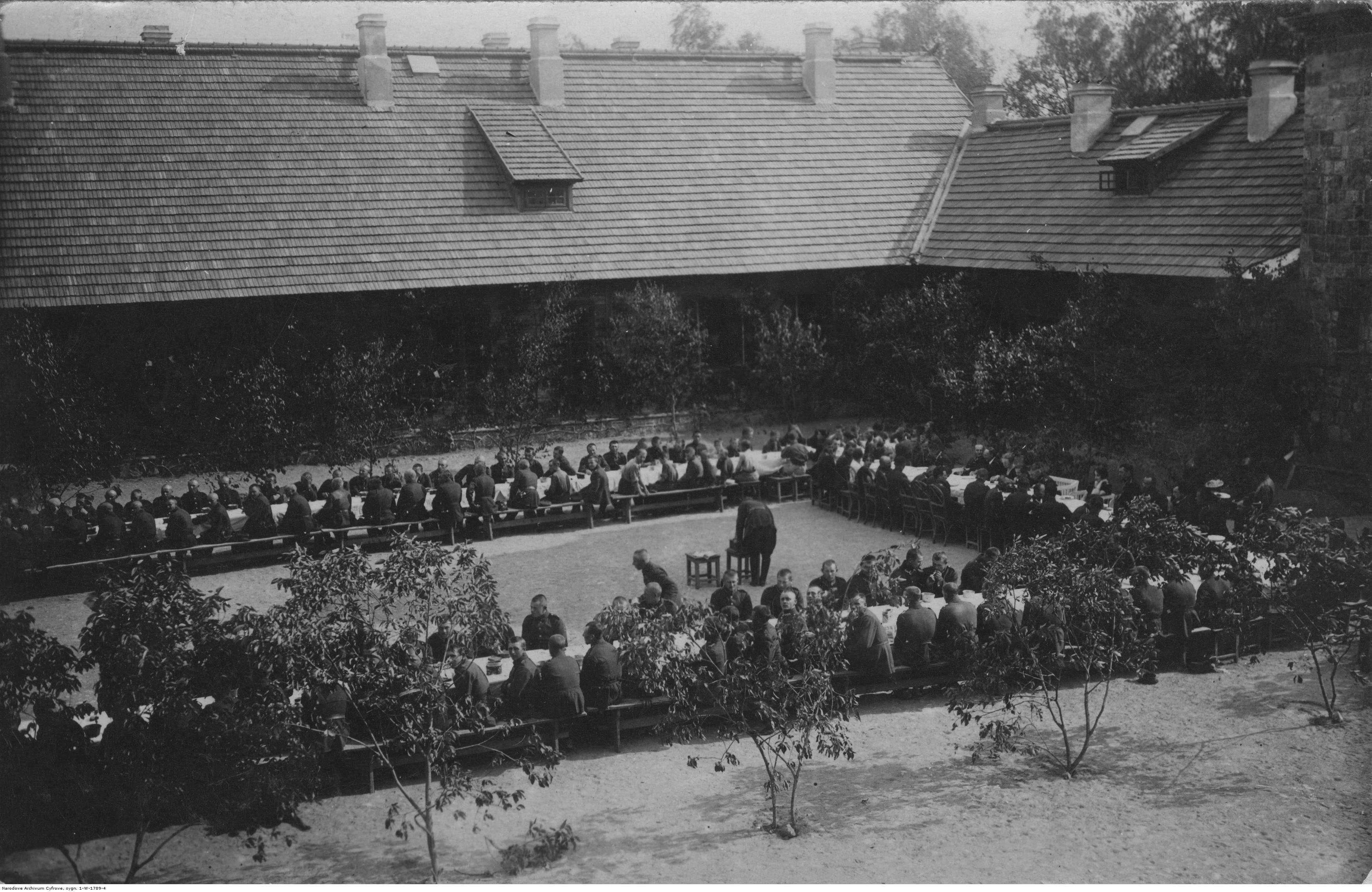 Święto żołnierza polskiego w 17 Batalionie Korpusu Ochrony Pogranicza "Dawidgródek". Obiad żołnierski na dziedzińcu koszar 17 Batalionu KOP. Koncern Ilustrowany Kurier Codzienny - Archiwum Ilustracji